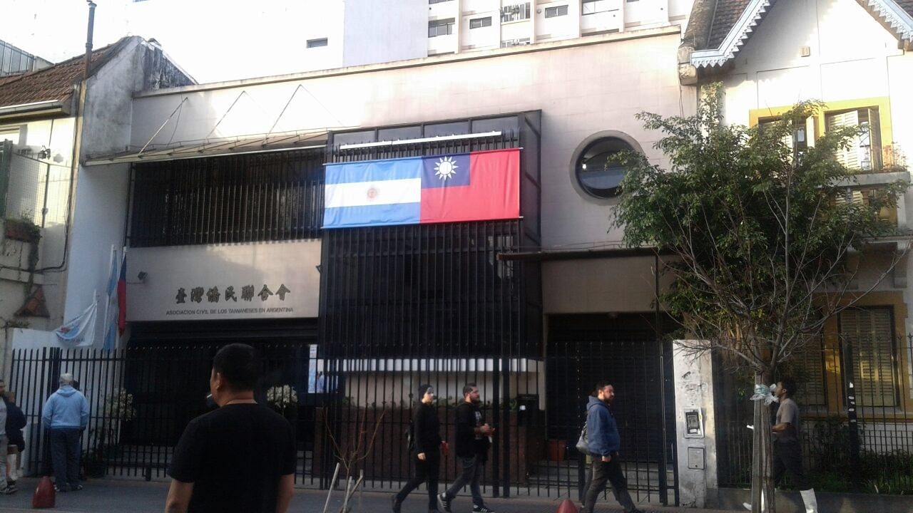 Asociación civil de los taiwaneses en Argentina localizada en el barrio chino de Buenos Aires.